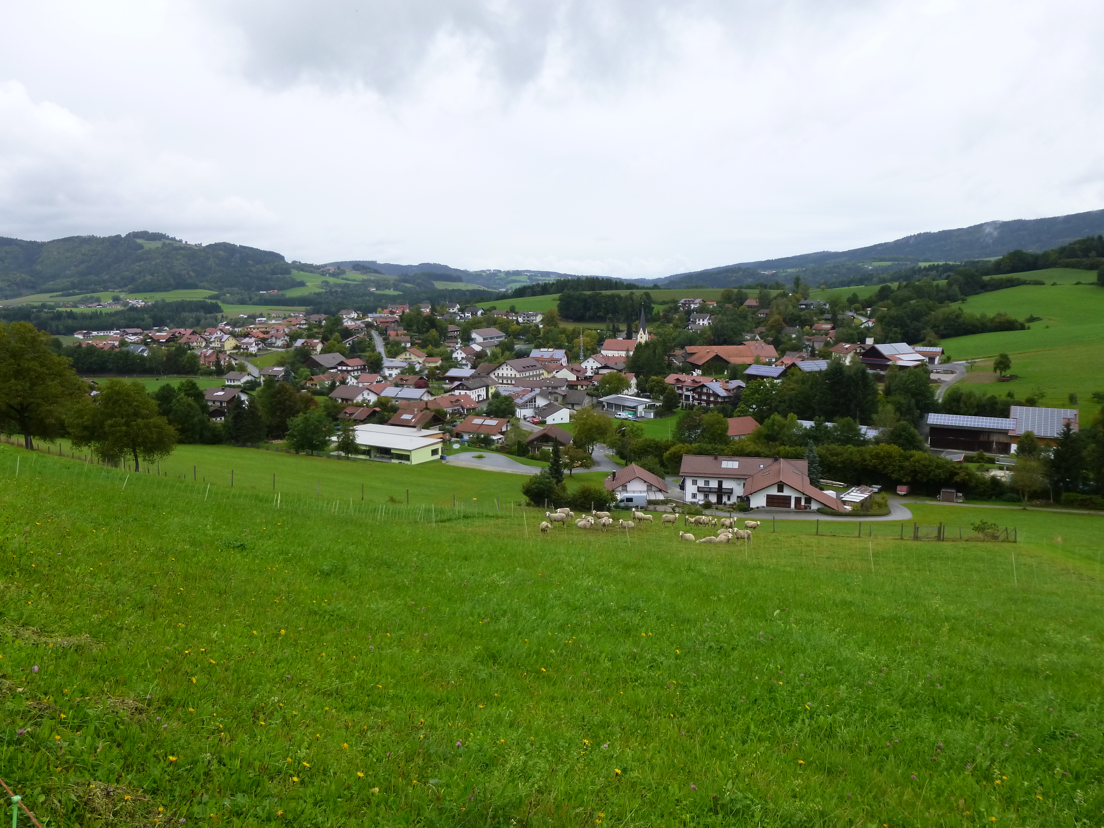 Blick vom Hofberg auf den Ort Haibach; Landkreis Straubing-Bogen.